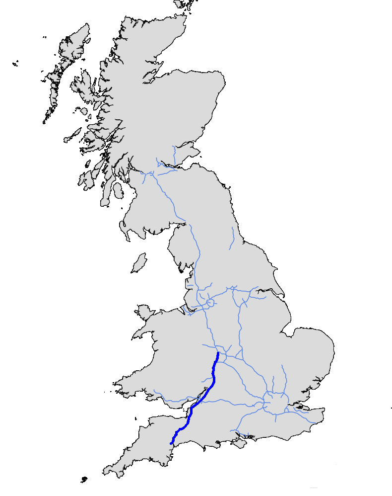 M5